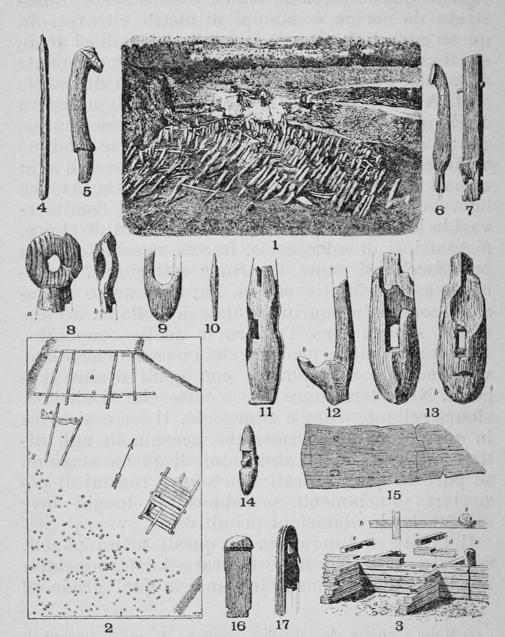 Terramare di Castione de' Marchesi (l'arma). Età del Bronzo.